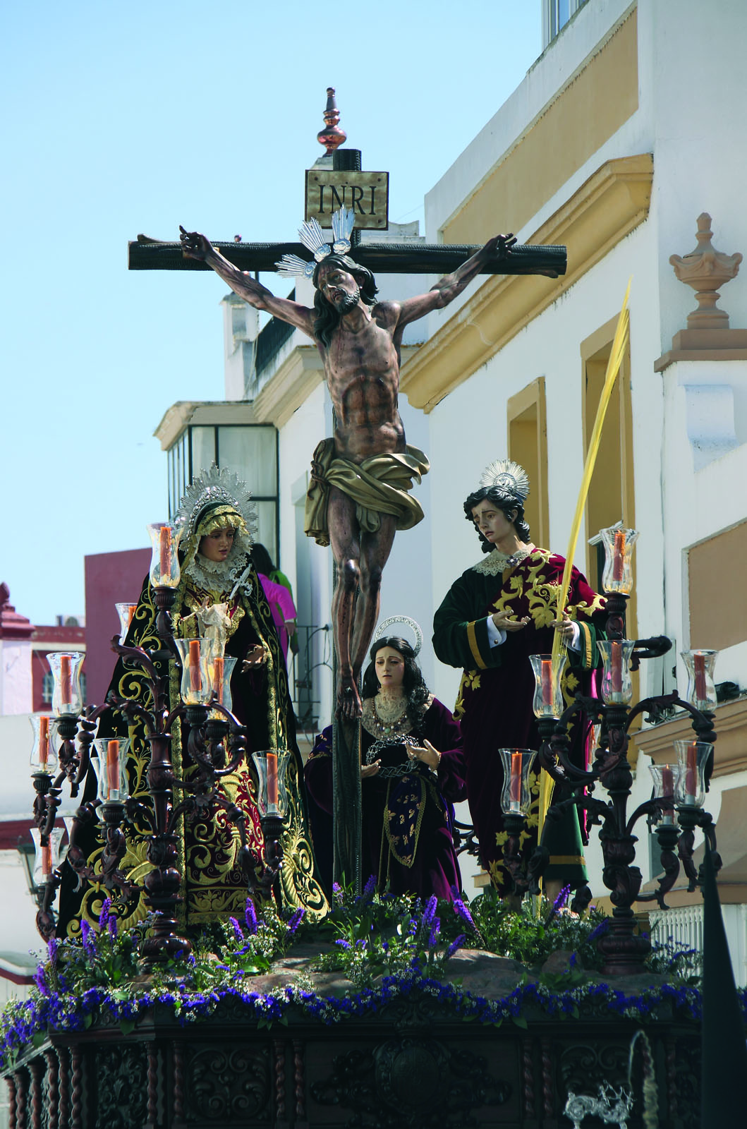 Calvario de la Hermandad de la Expiración en la Procesión Magna de 2010